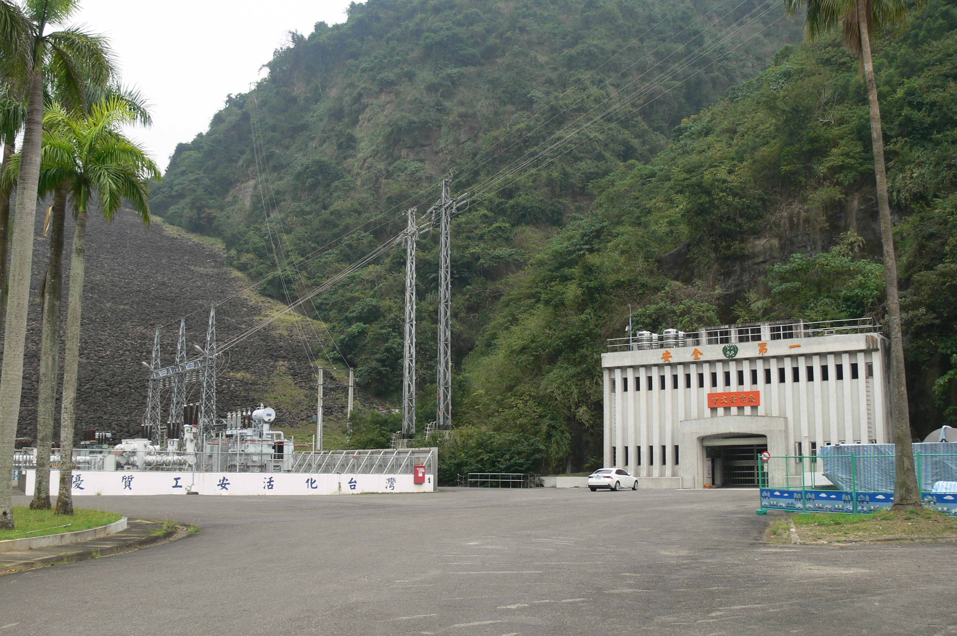 曾文發電廠廠房大門。此照片由經濟部水利署南區水資源局提供，並同意以創用CC姓名標示 - 相同方式分享於維基百科之上。